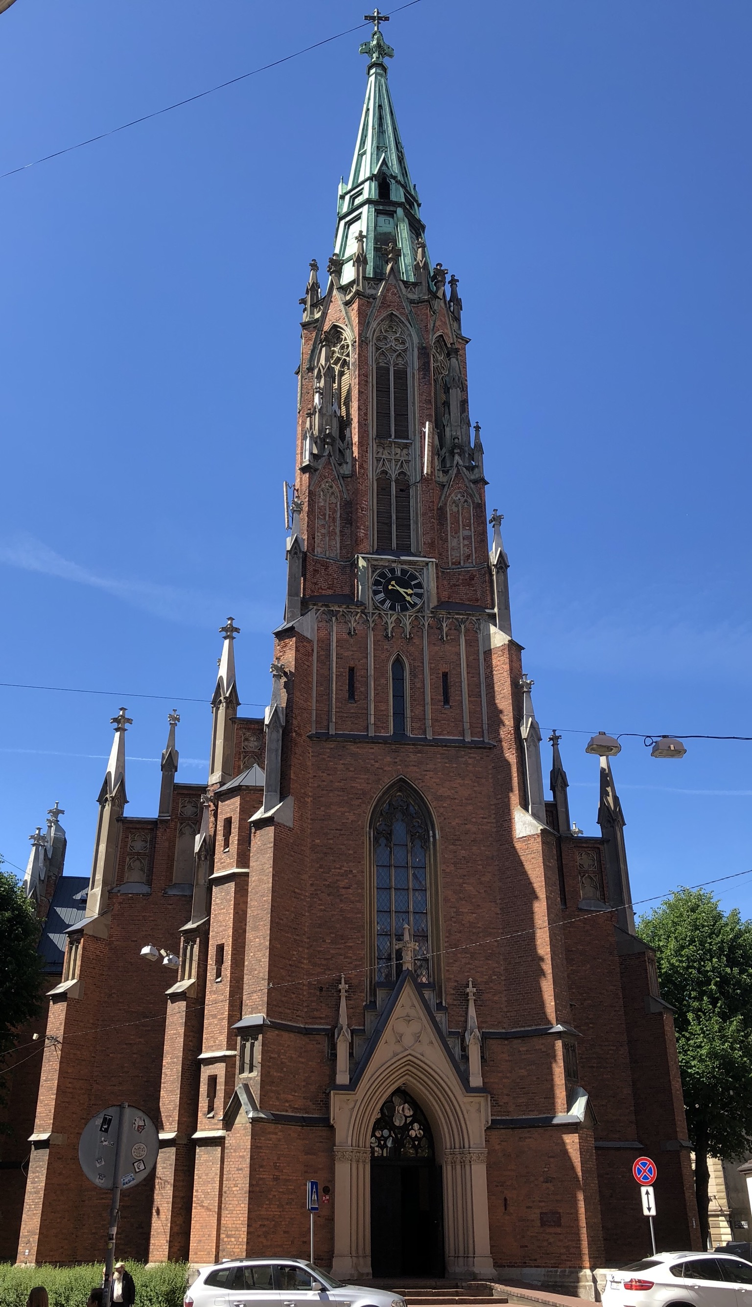 Sankt Gertrud Kirche in Riga